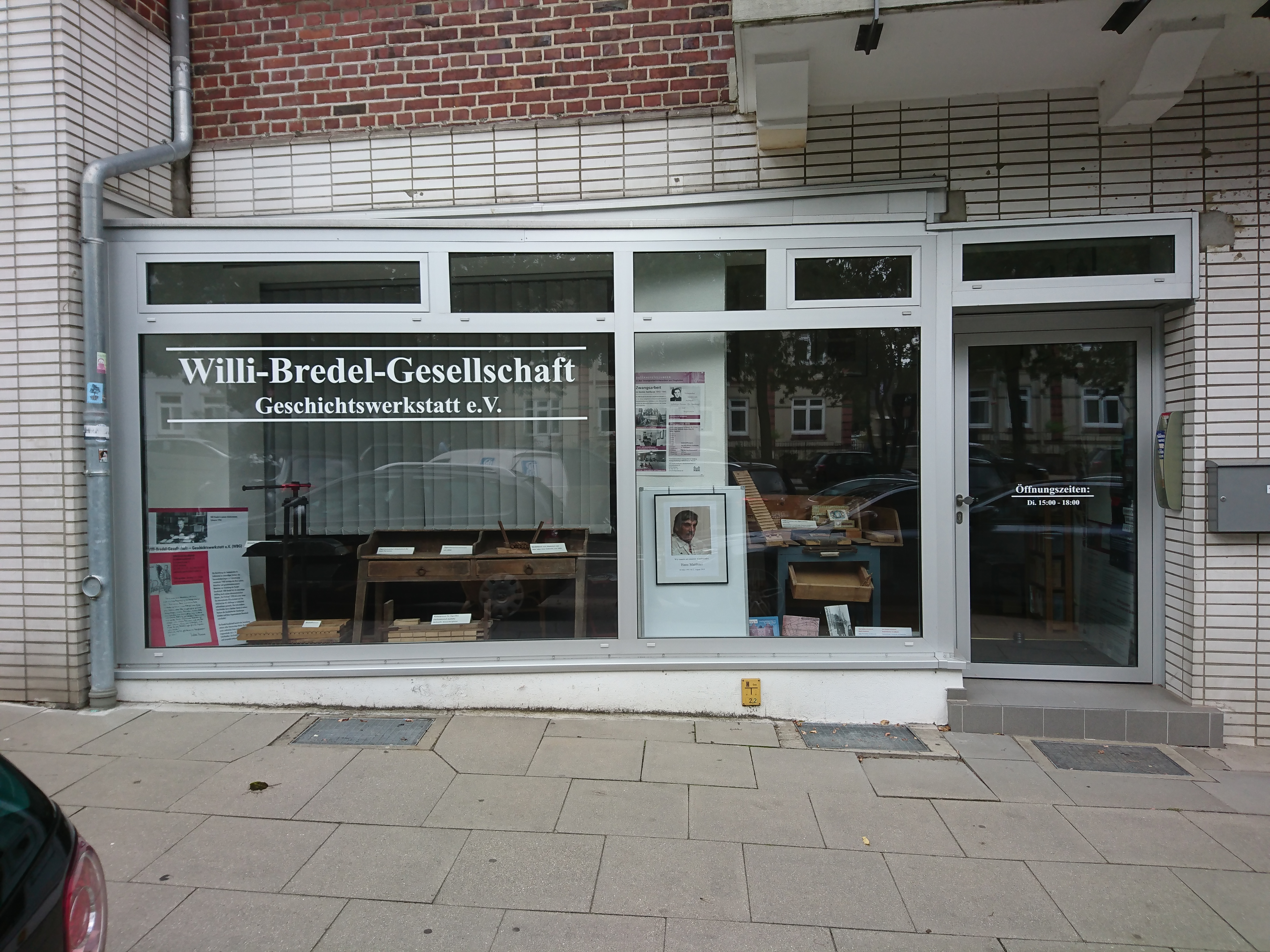 Willi-Bredel-Gesellschaft Geschichtswerkstatt e.V., Ratsmühlendamm 24, Hamburg-Fuhlsbüttel